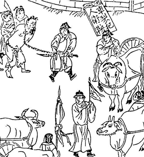 商鞅被车裂，载明刻本《新列國志》插图